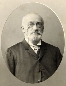 Eduard Mathias Sturm